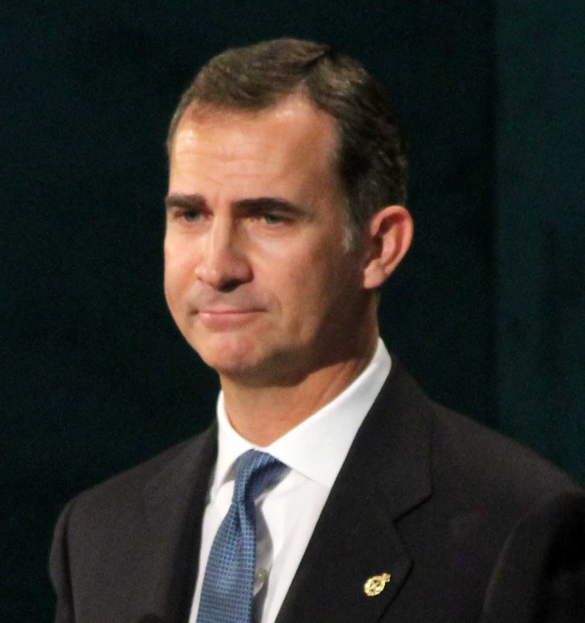 Felipe VI, rey de España, en la ceremonia de entrega de los Premios Princesa de Asturias 2015.